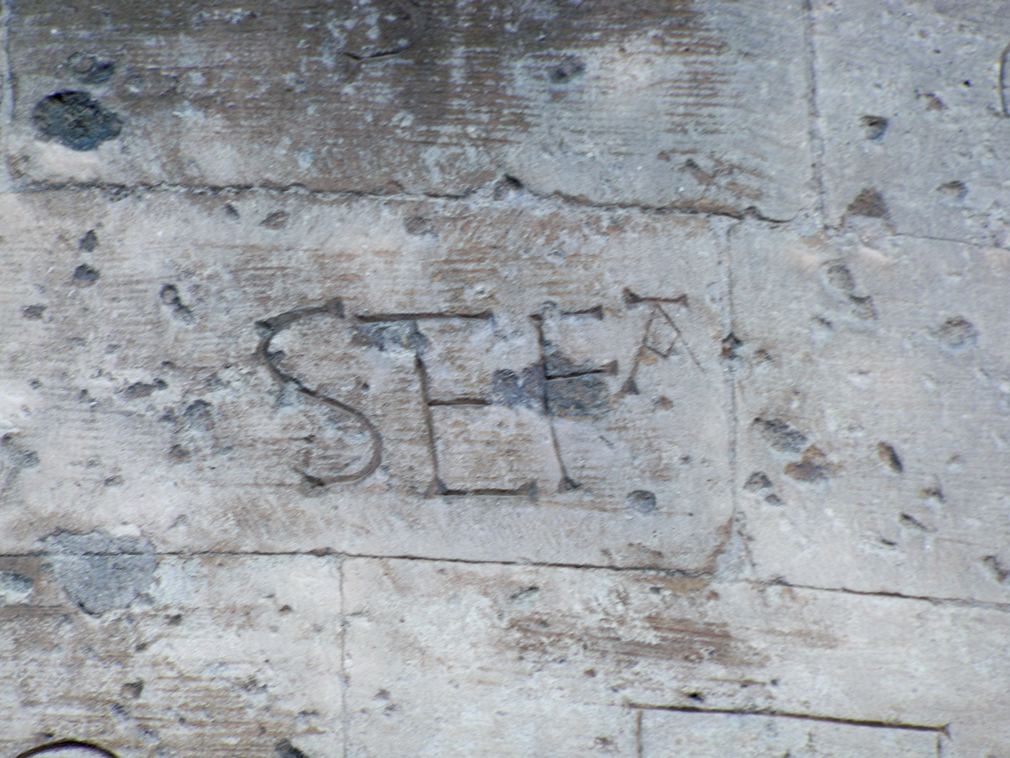 Cathédrale Notre-Dame de Saint-Paul-Trois-Châteaux : marque de tacheron .